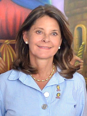 Vicepresidenta de Colombia Marta Lucía Ramírez